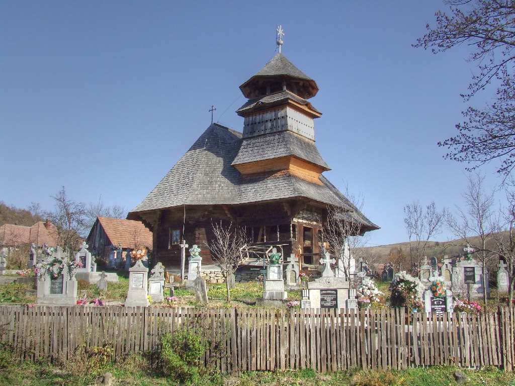 Biserica de lemn din Săcalu de Pădure, judeţul Mureş.